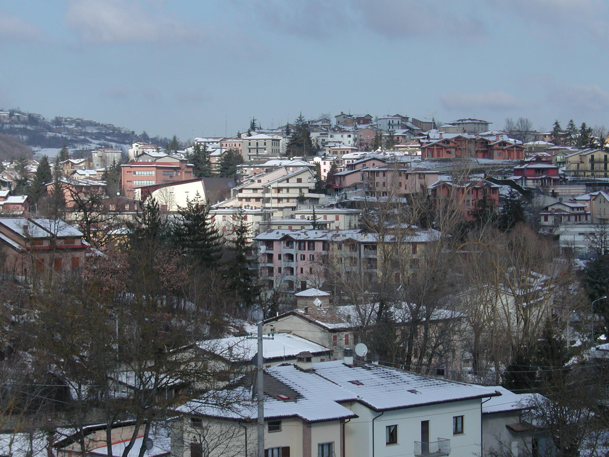 Casina, comune dell'Appennino reggiano, Provincia di Reggio Emilia, Italy